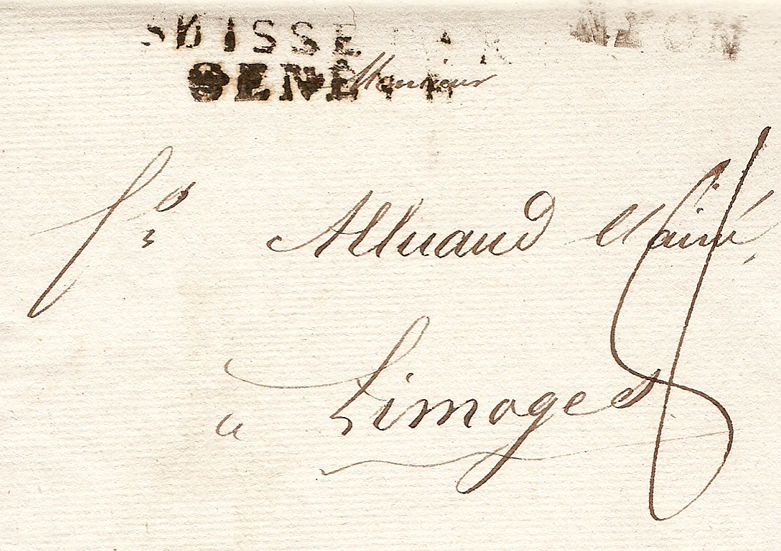 Lettre de Suisse de 1811 (Nyons) avec Marque d'entrée en France par Genève